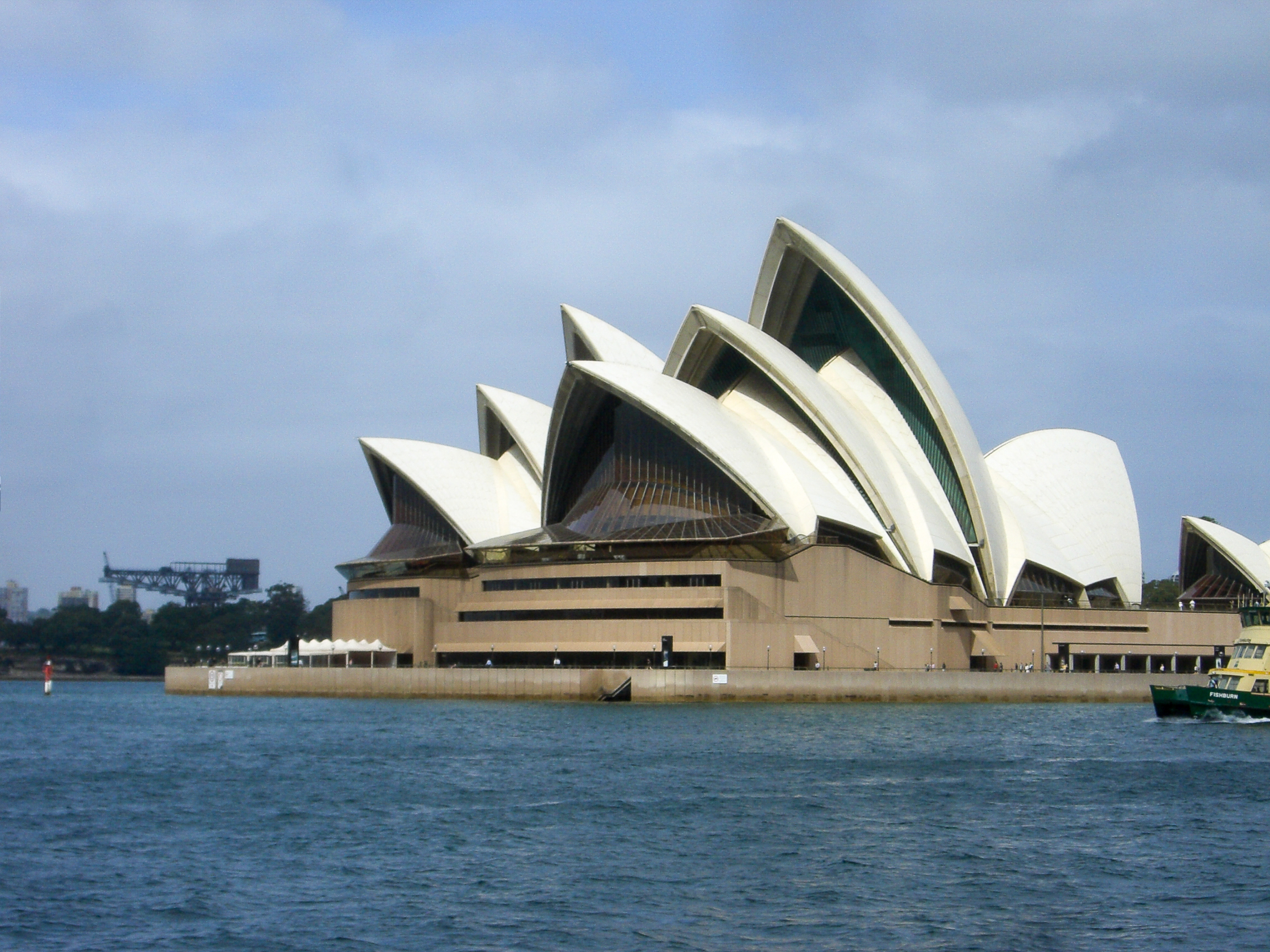 Die Oper in Sydney